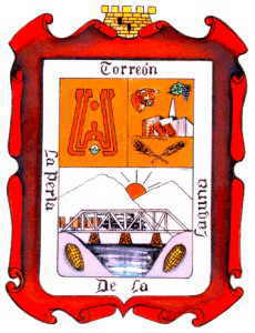 Escudo de armas del municipio de Torreón, estado de Coahuila de Zaragoza, México